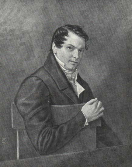 Нарышкин М.М.